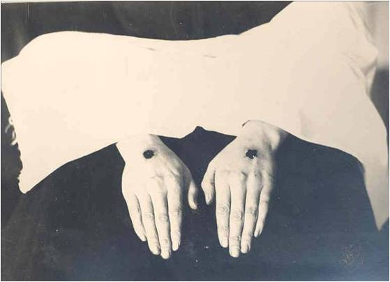 Stigmata